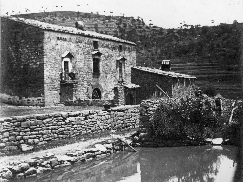 Vista general de l'Hostal del Boix amb una bassa d'aigua en primer terme. Cèsar August Torras i Ferreri (Entre 1890 i 1923)